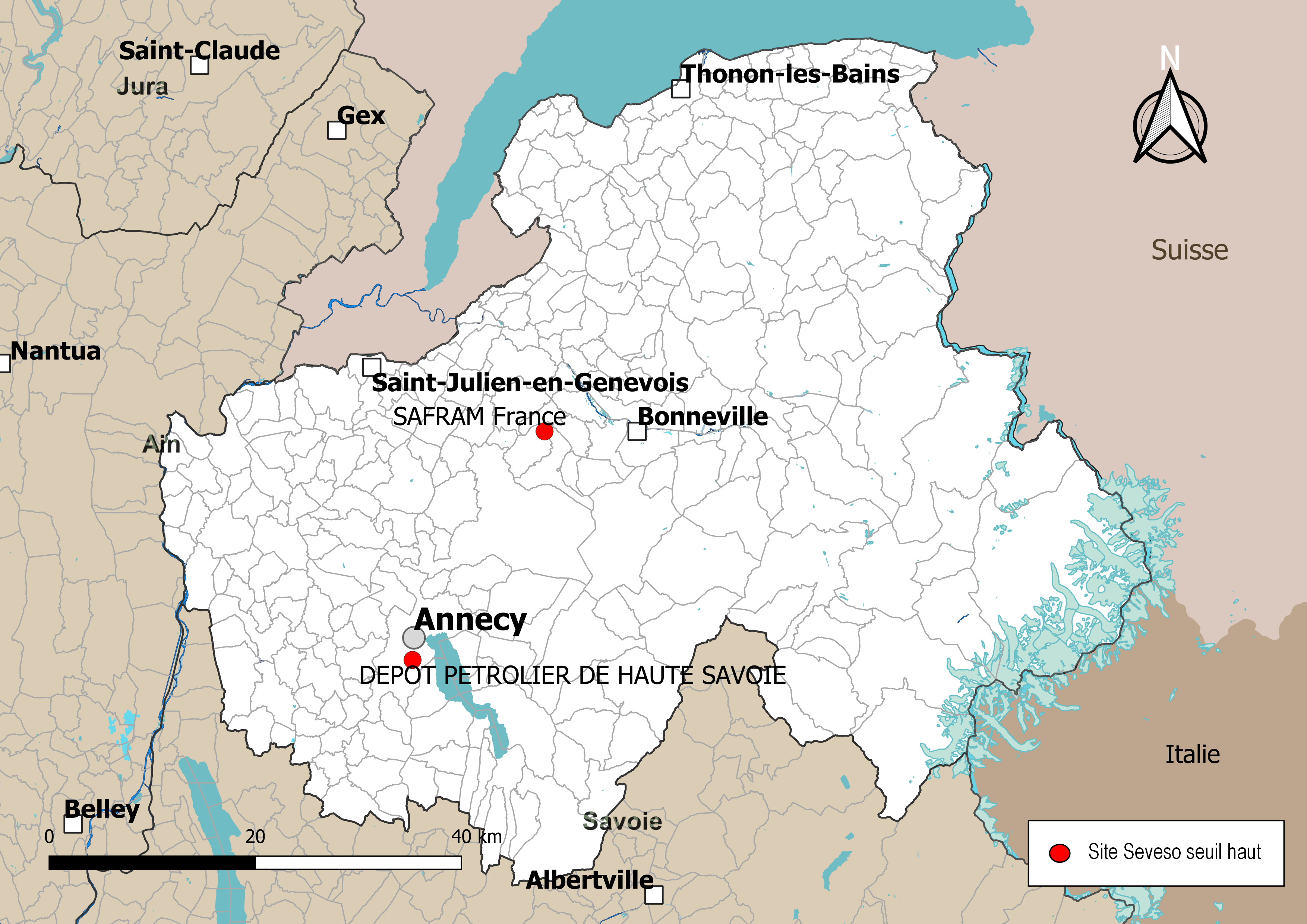 Carte de localisation des sites Seveso seuil haut dans le département de la Haute-Savoie (Auvergne-Rhône-Alpes, France). Carte arrêtée au 9 novembre 2019.